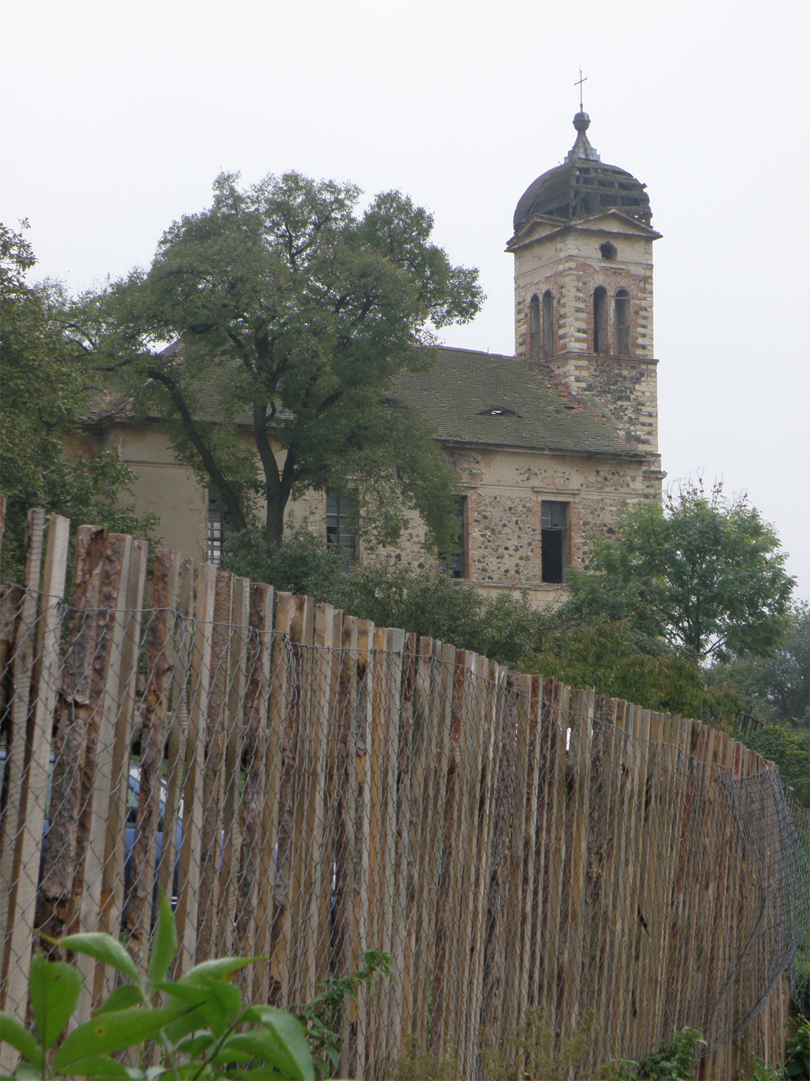 Kostel sv. Jakuba Většího, Mrzlice, okres Teplice (říjen 2011)